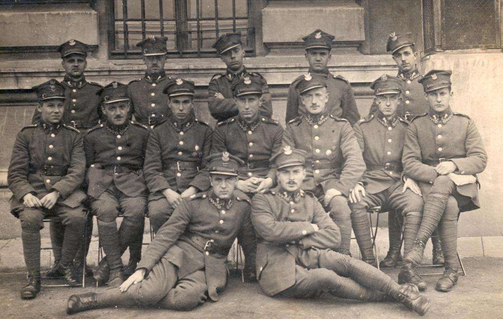 Szkoła Podchorążych w Warszawie, 1920 (pierwszy z lewej stoi Jerzy Rossowski)